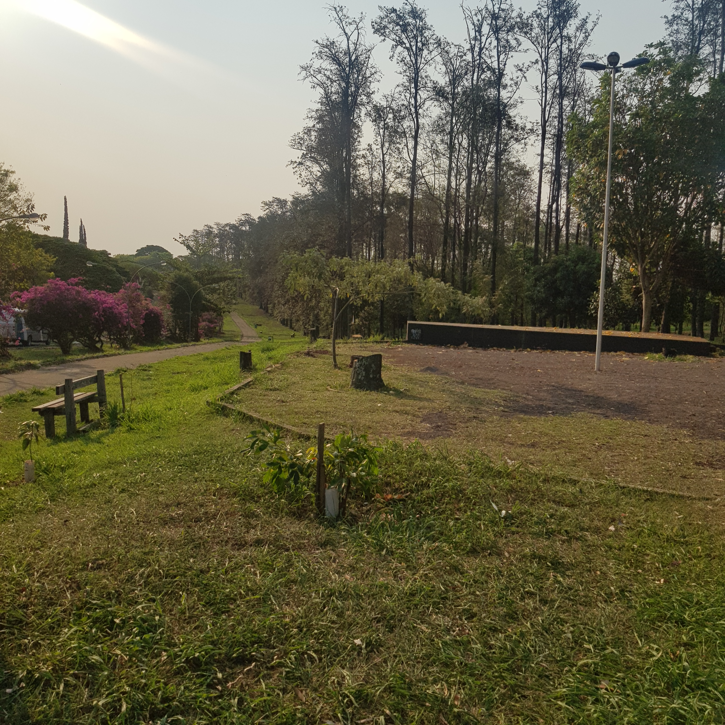 Vista para as copas das grevíleas